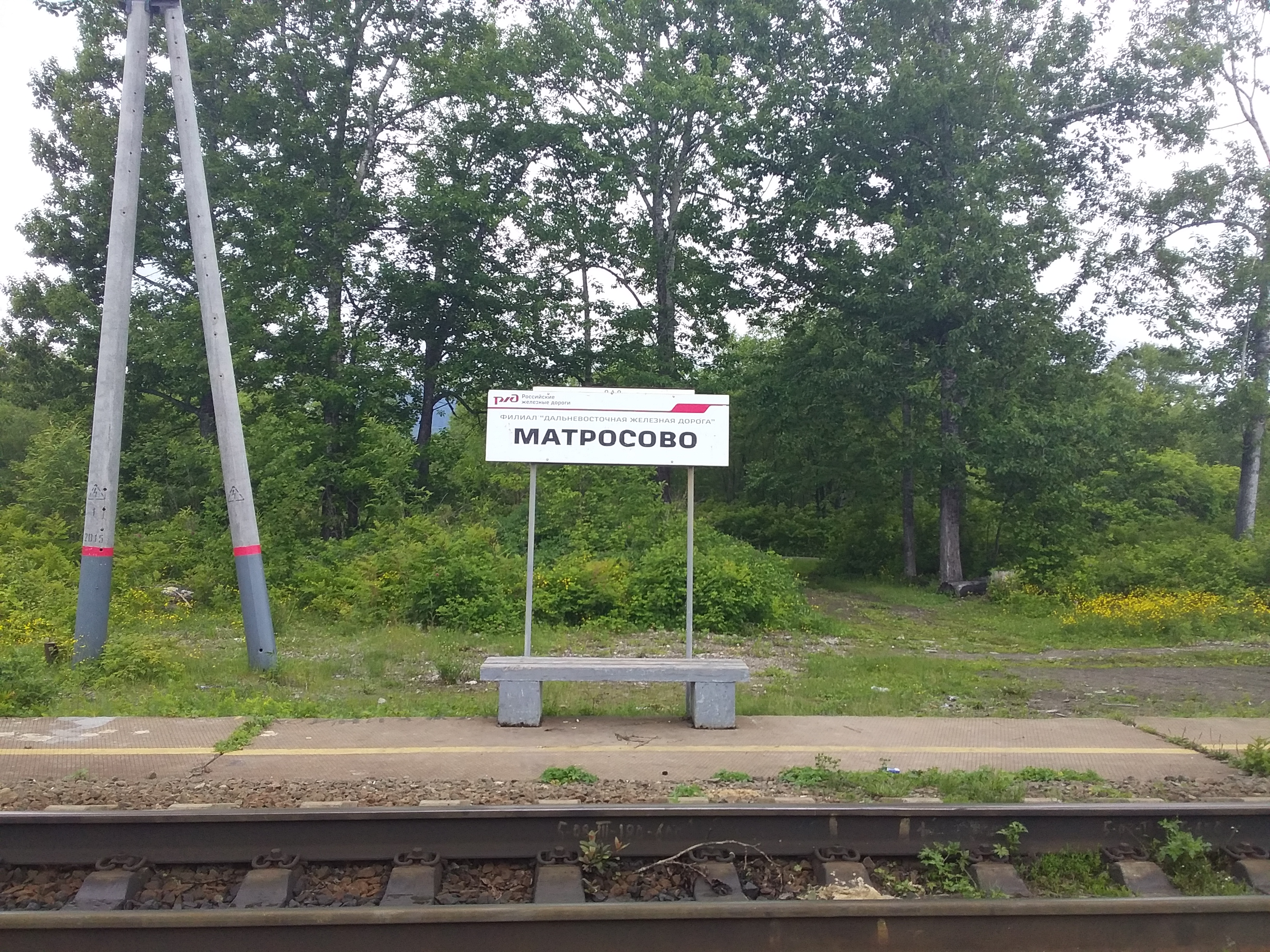 Сахалинский регион ДВЖД, станция Матросово